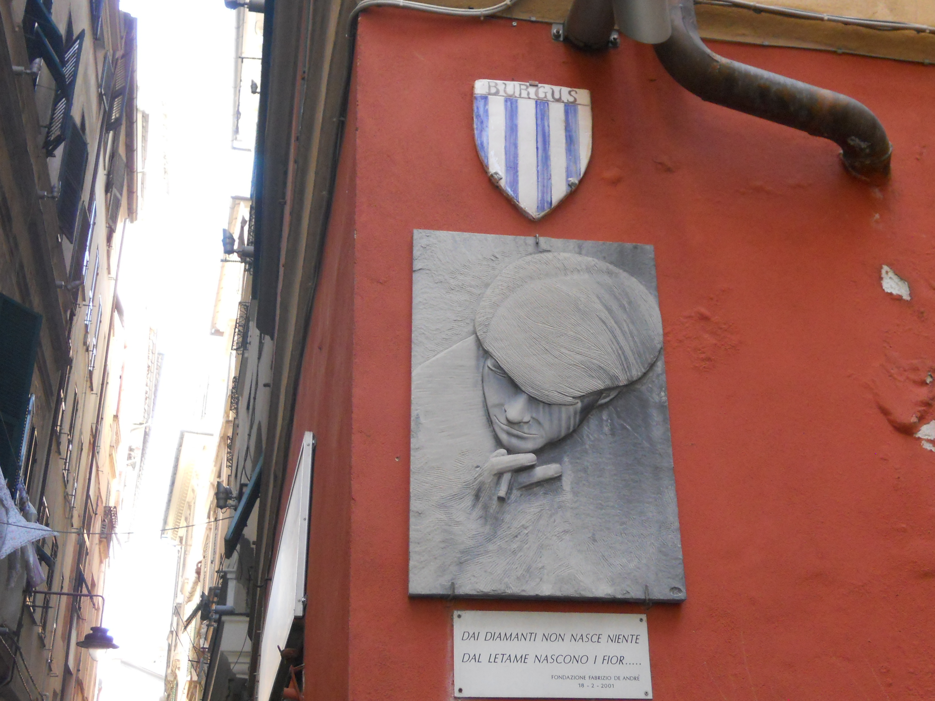 Targa intitolata a Fabrizio de Andrè in Via del Campo a Genova